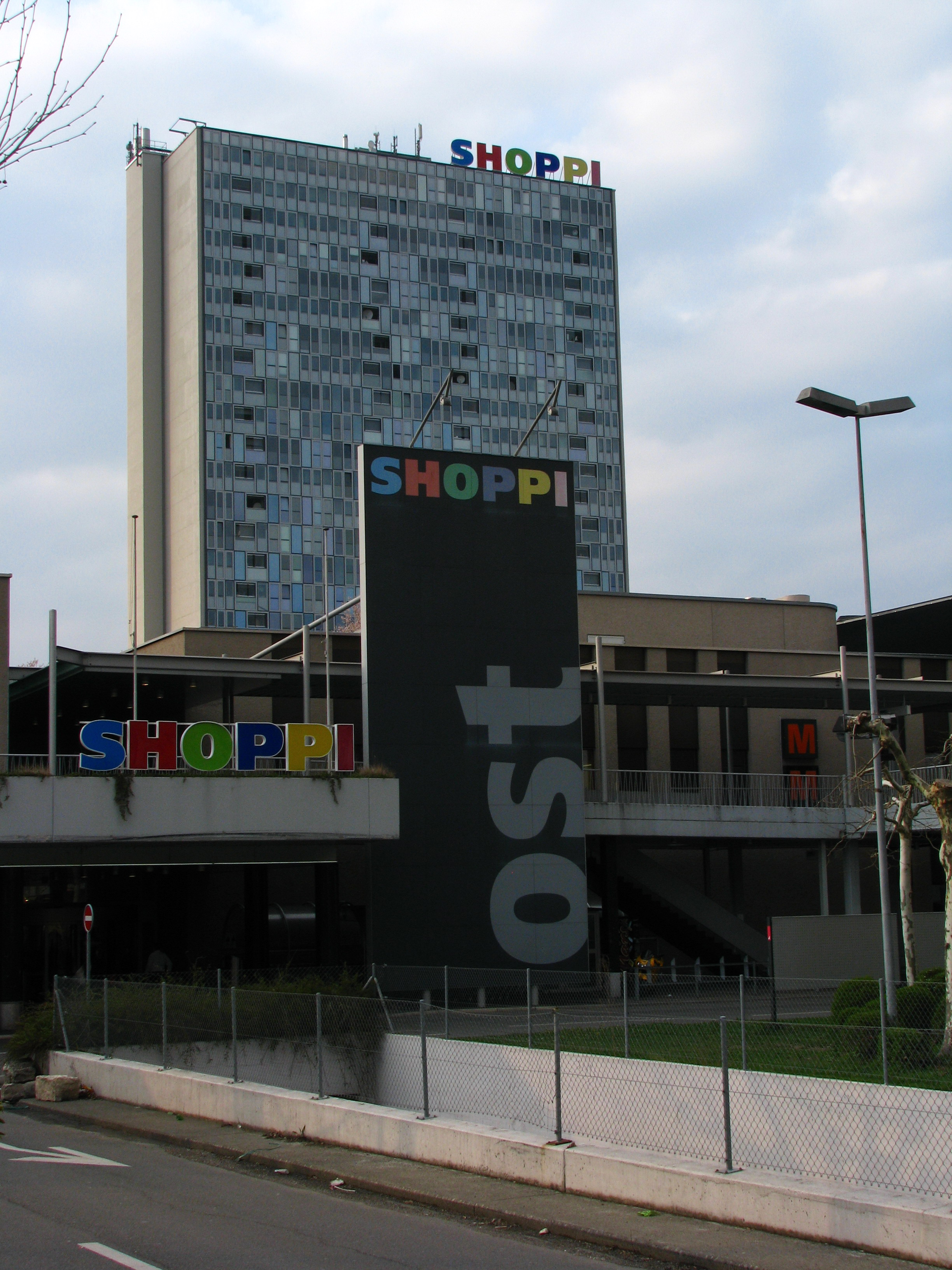 Shoppi in Spreitenbach in the Limmat Valley (Switzerland)